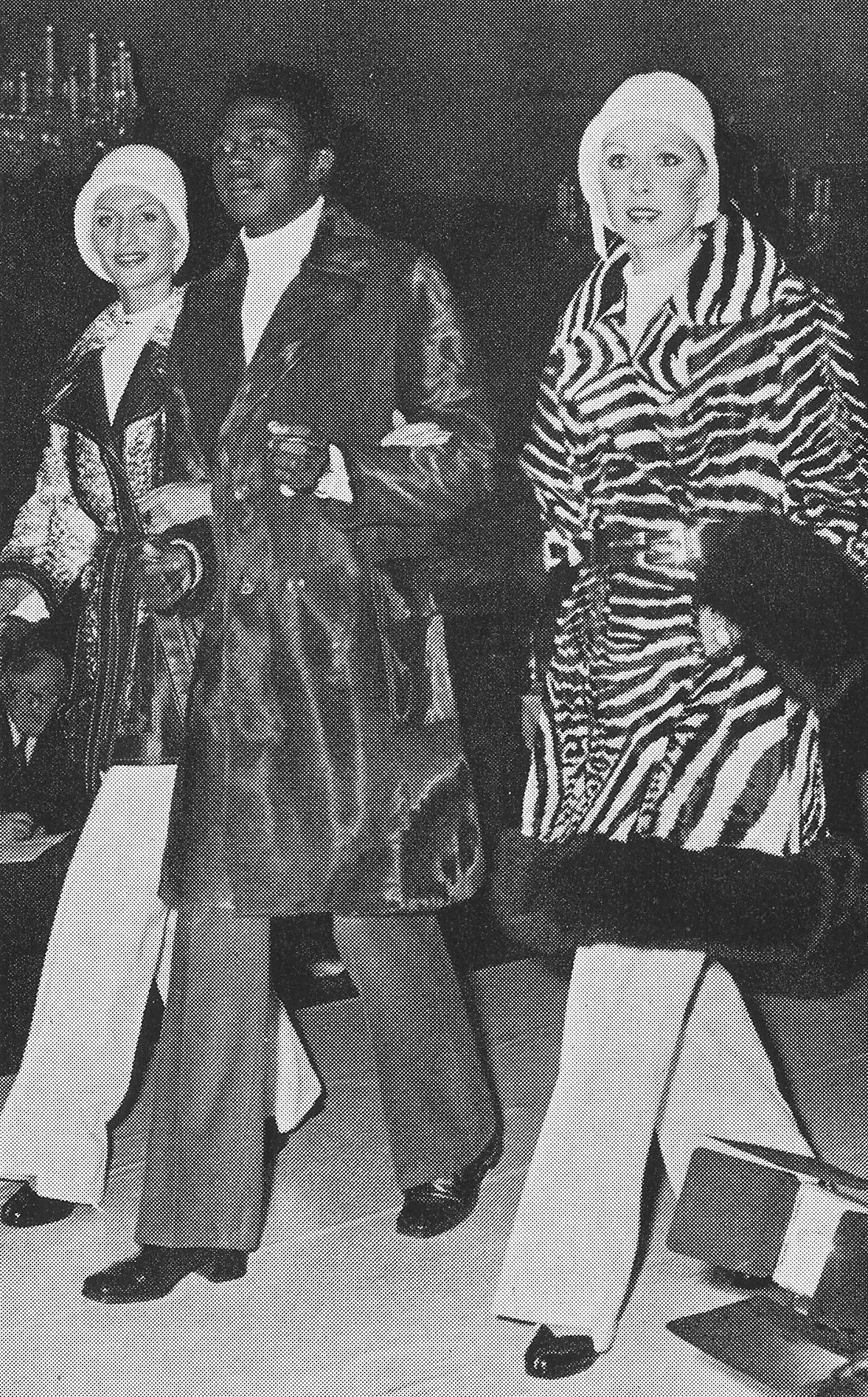 Gemeinschaftsmodenschau des Pelzzentrums Frankfurt am Main, 27. September 1973 im Hotel Intercontinental. Choreographie und Inszenierung Jürgen Mokri und Klaus Dahle. Kalbmäntel, rechts mit Zebradruck und Fuchsbesatz..